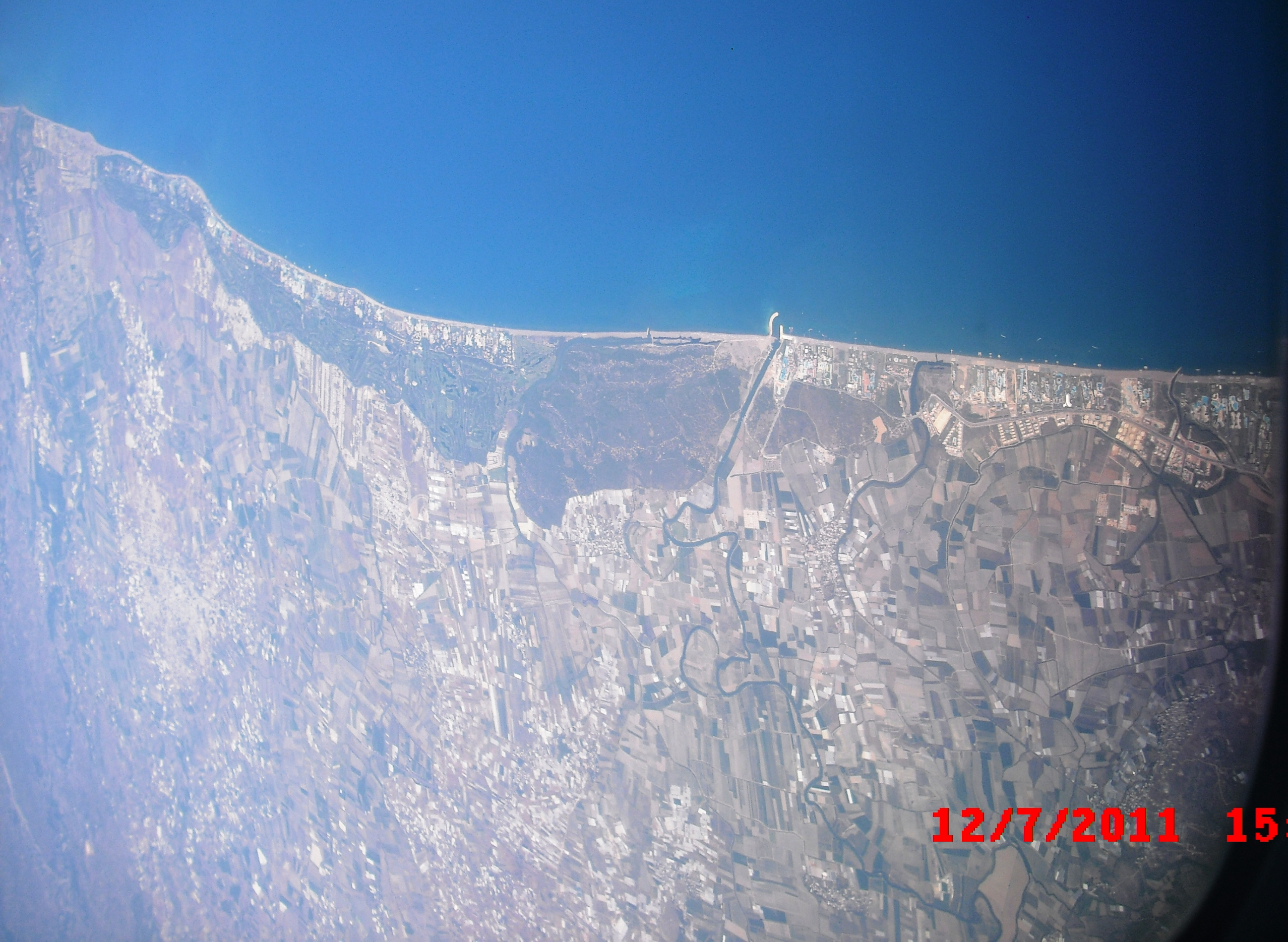 Aksu Çayı, Serik-Aksu ,lçeleri sınırı